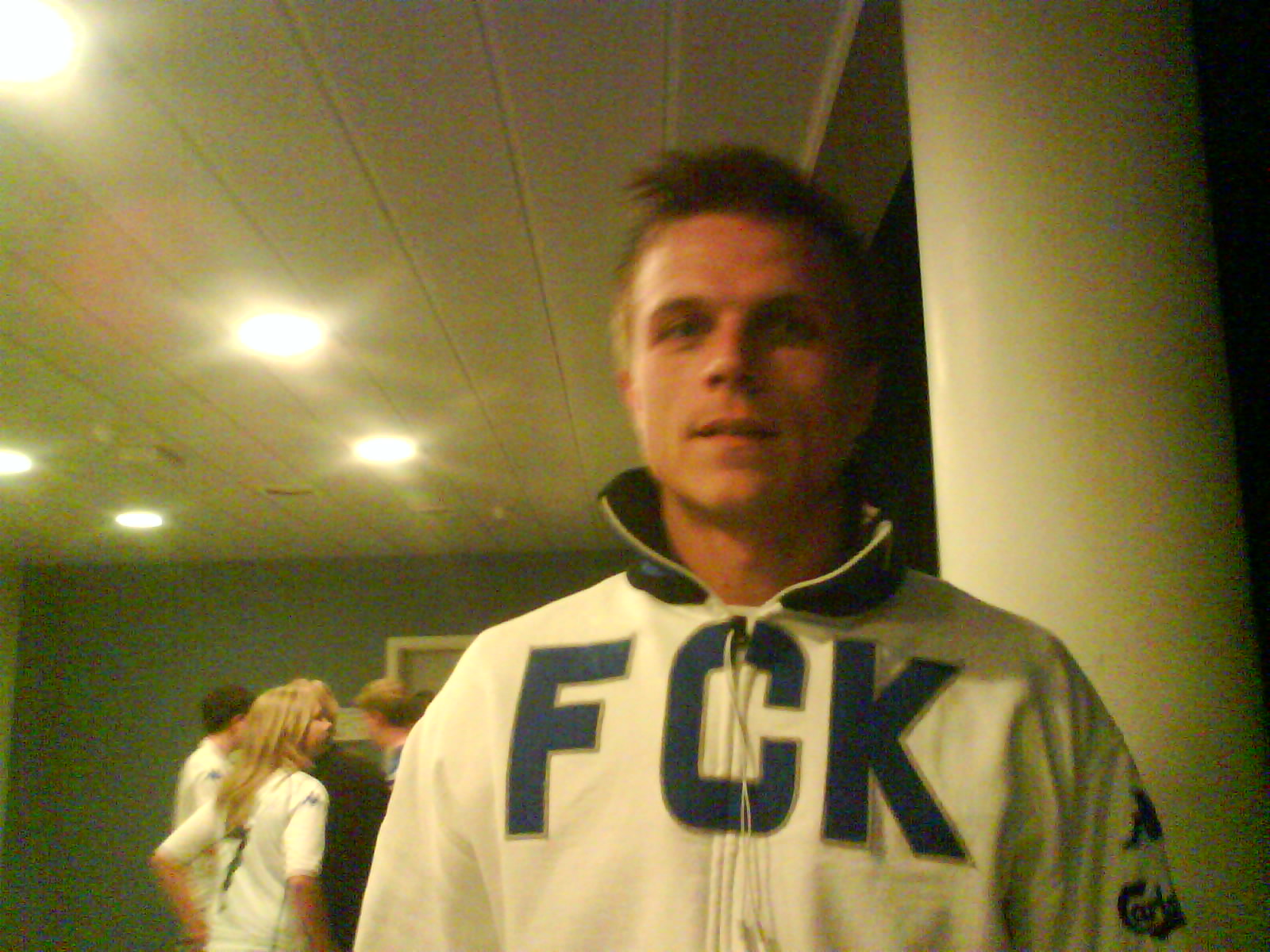 Jesper Grønkjær